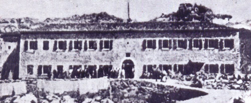 Crnogorski: Bolnica „Danilo I“ Cetinje 1873. godine